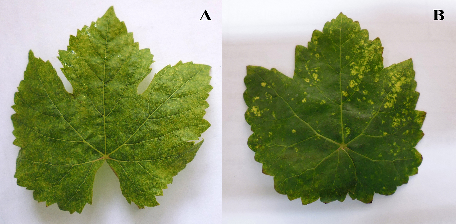 อาการด่างจุดเหลือง Grapevine yellow speckle viroid บนใบองุ่น